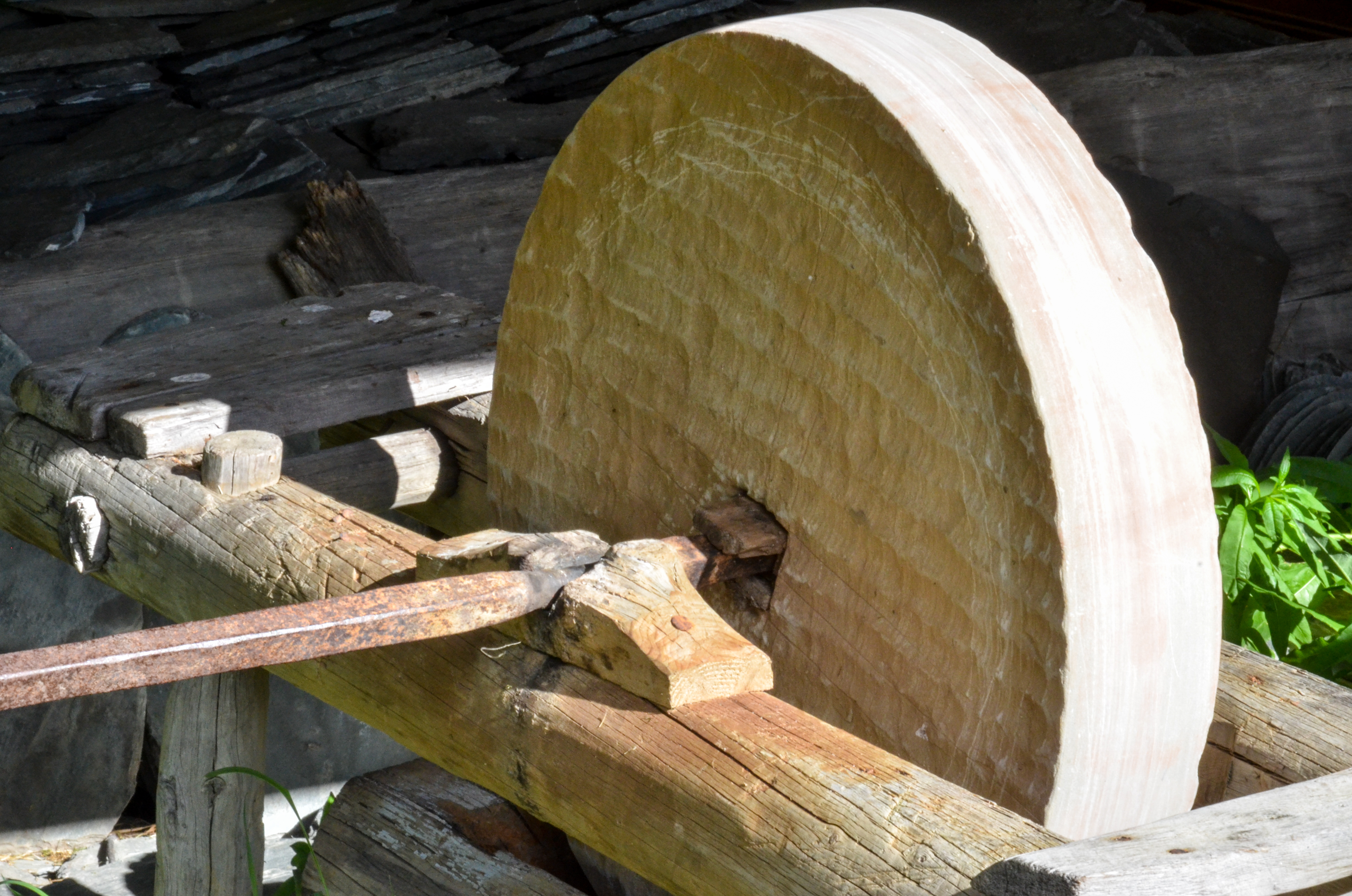 Schleifstein aus Sandstein, Bearbeitungsspuren